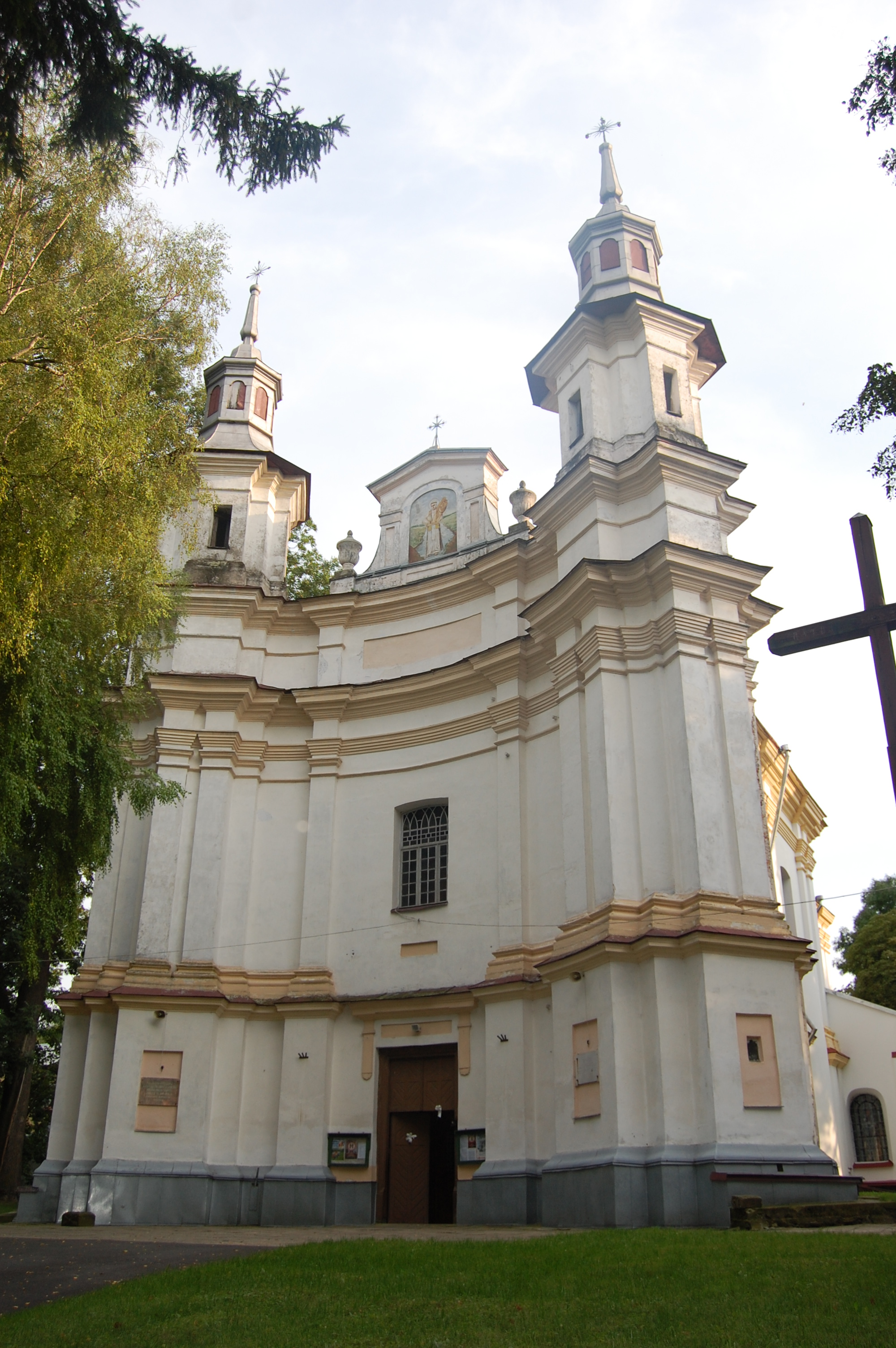 Fasada kościoła św. Jacka w Horodle